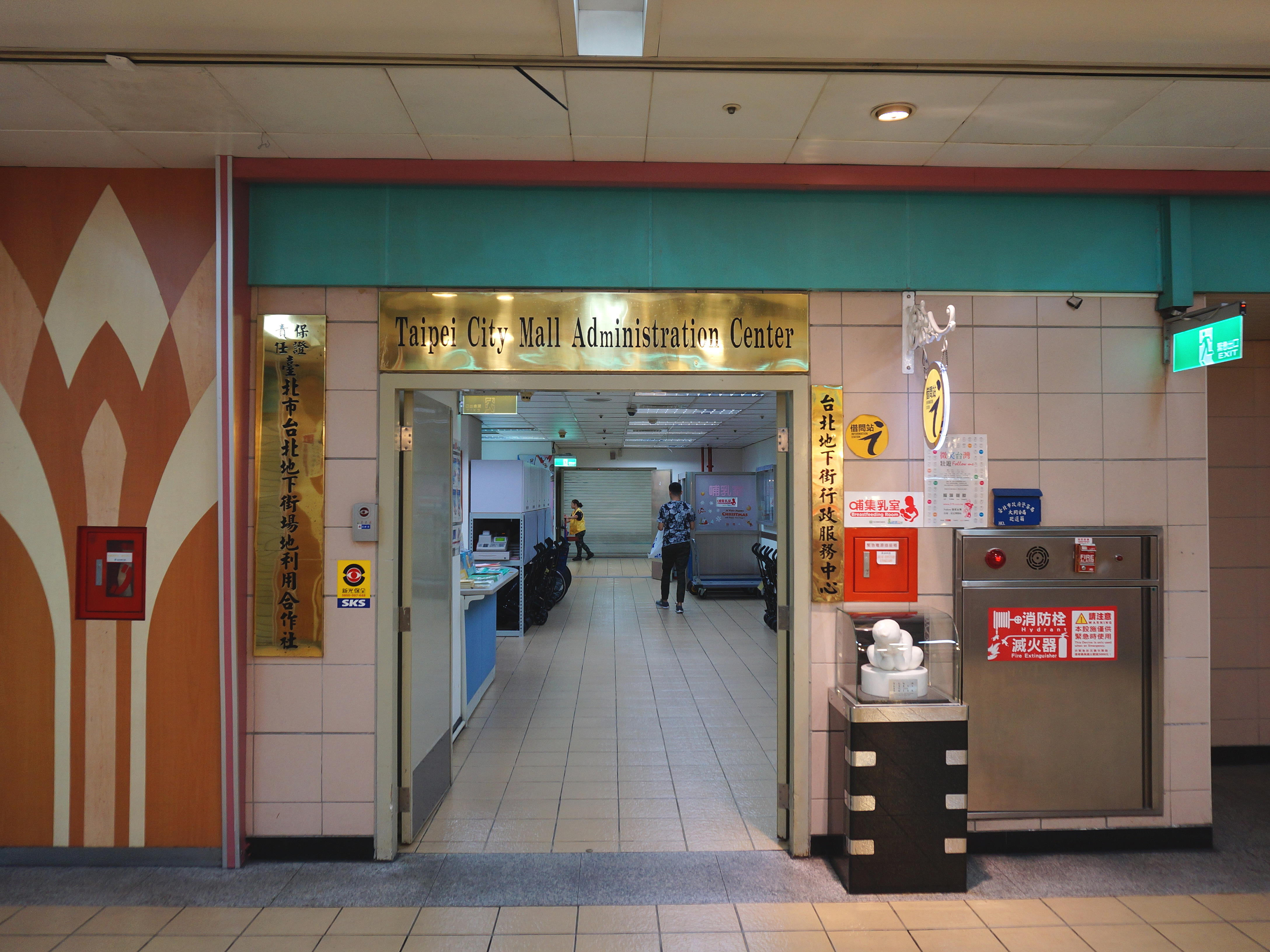 台北地下街行政服務中心。